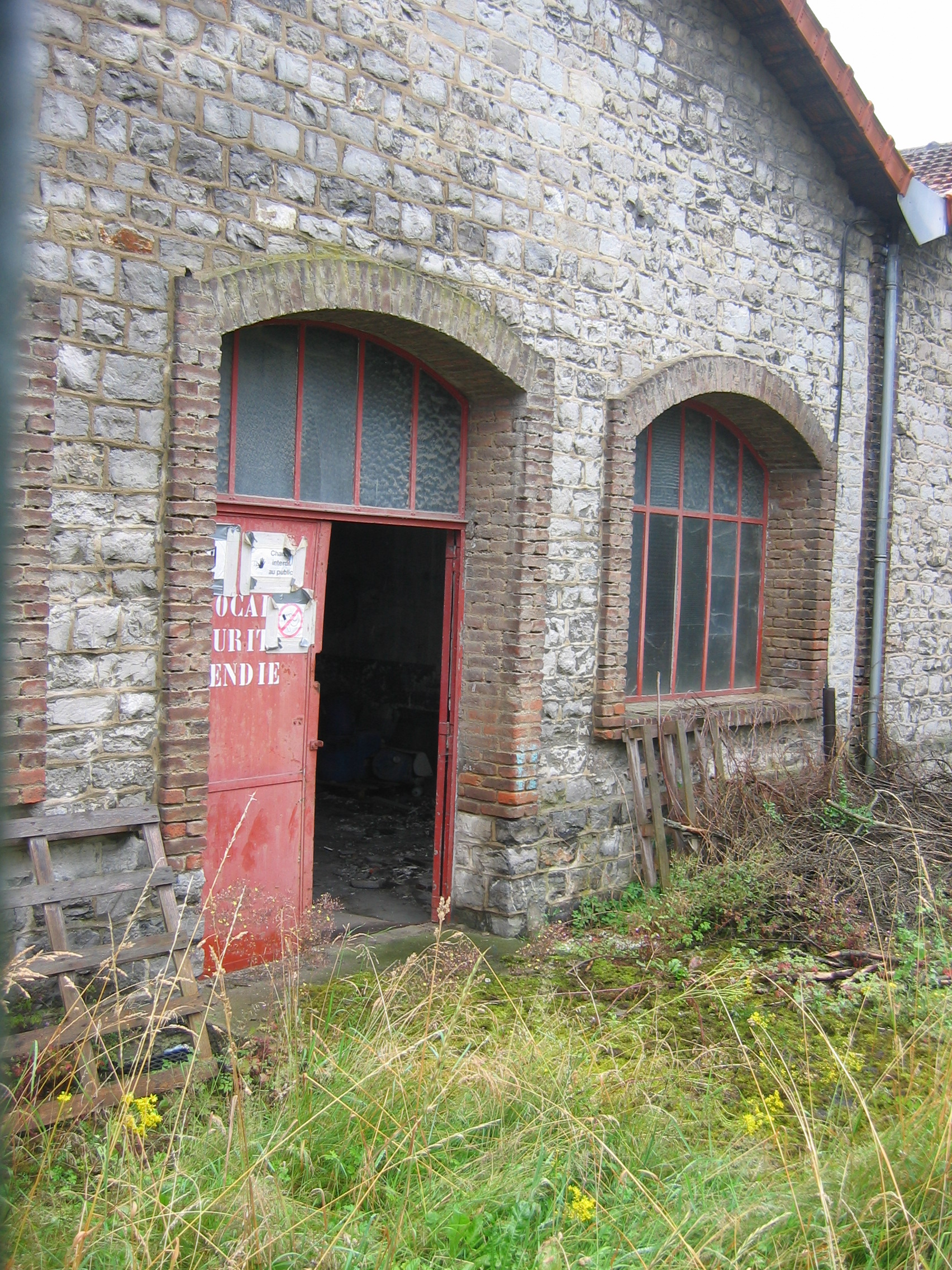 Site de Cellatex en 2012 à Givet, en Ardennes (France) 02